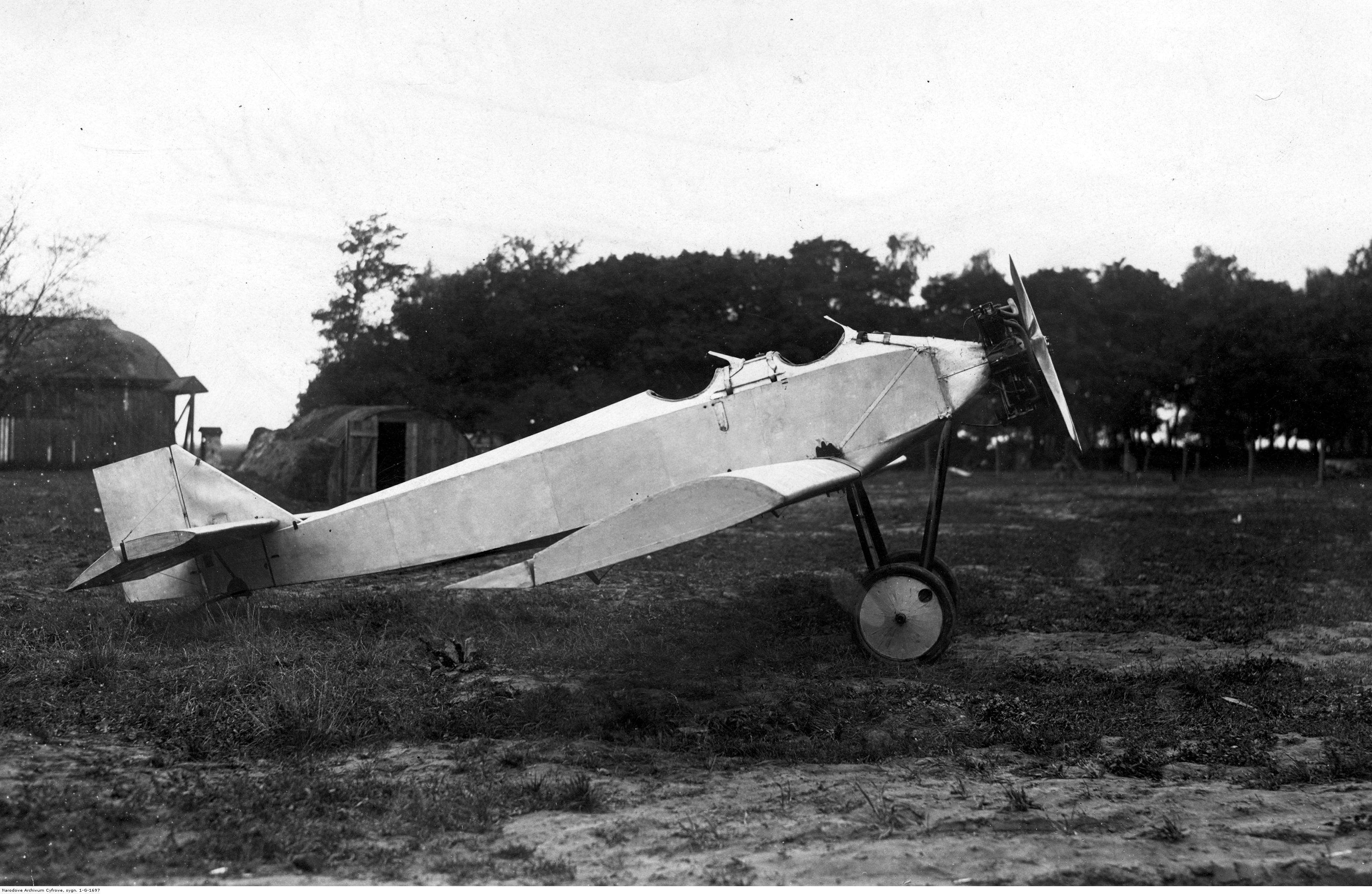 Samolot WK-1 Jutrzenka, konstrukcji Władysława Aleksandra Kozłowskiego, 1927 r.